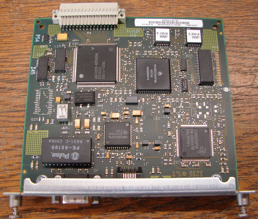 Interne HP Jetdirect J2555B Token Ring Printserverkarte.